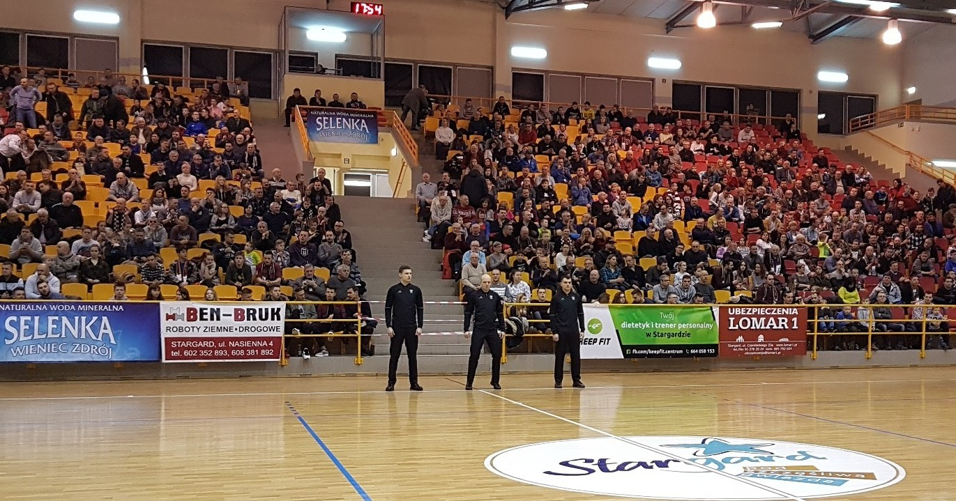 Stargard, 13.01.2018. Sędziowie meczu Spójnia z R8 Basket Kraków